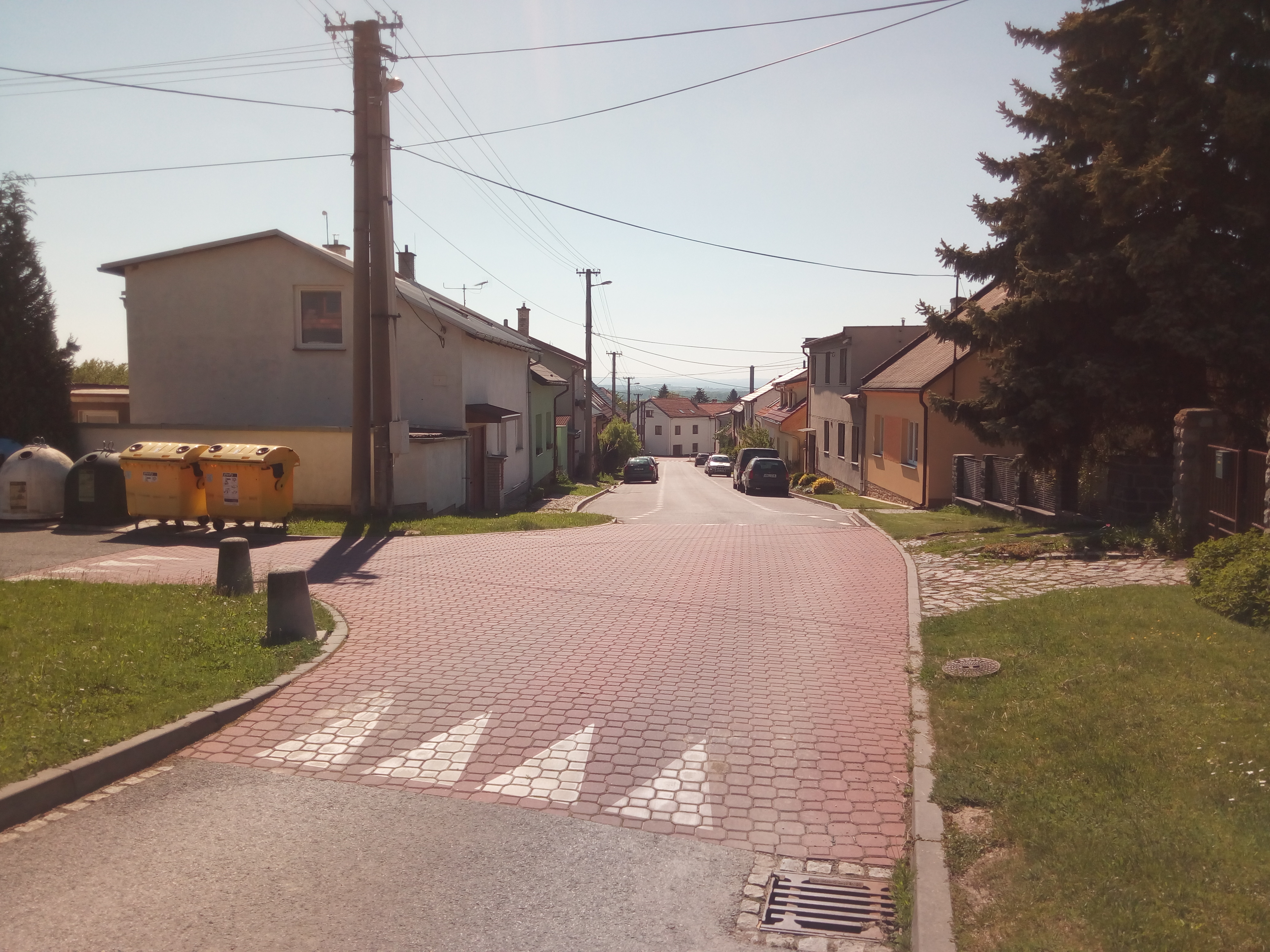 Cesta v Tovéři